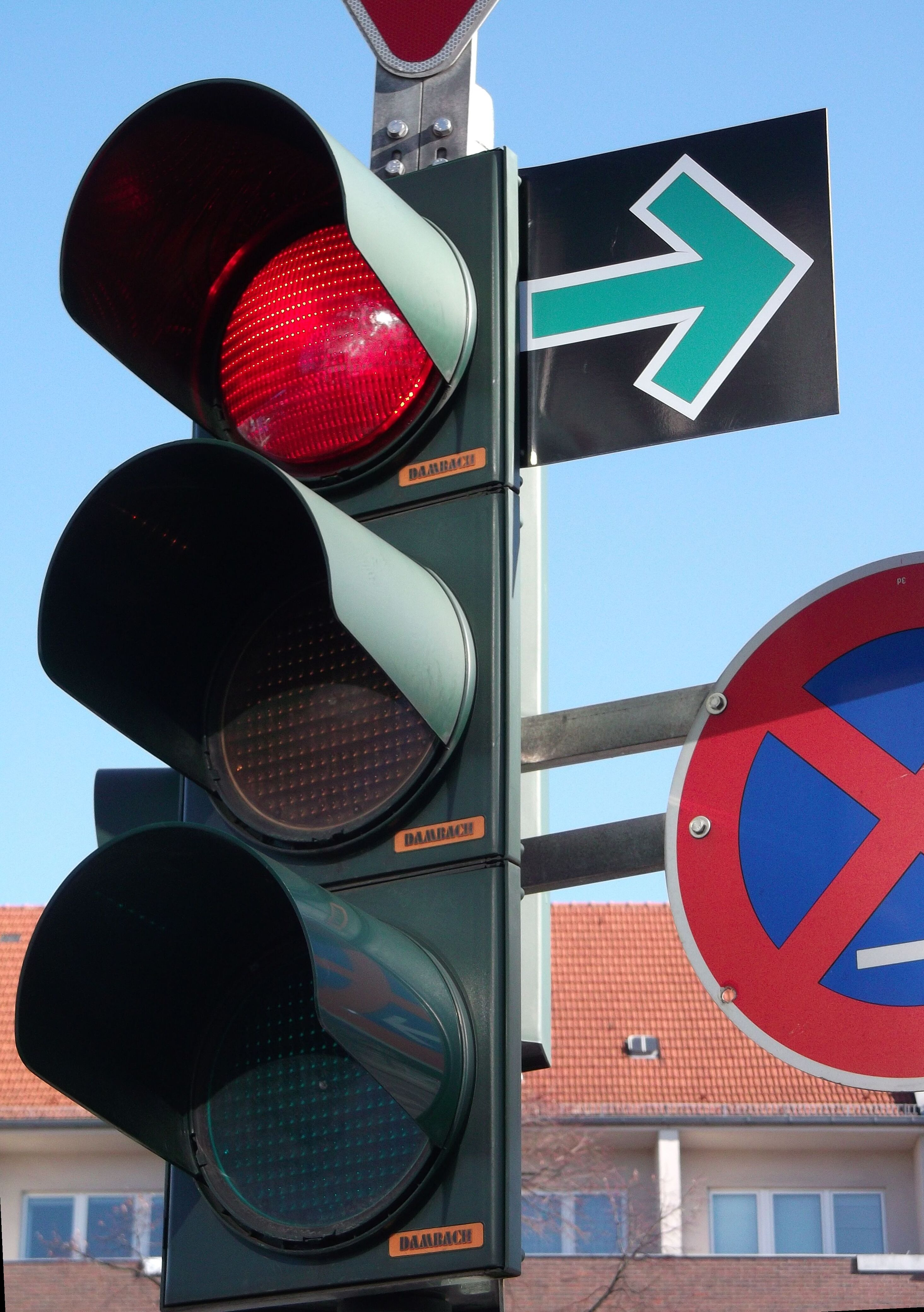 Grünpfeil (Zeichen 720) an der Kreuzung Seeburger Straße Ecke Wilhelmstraße / Klosterstraße in Berlin-Spandau